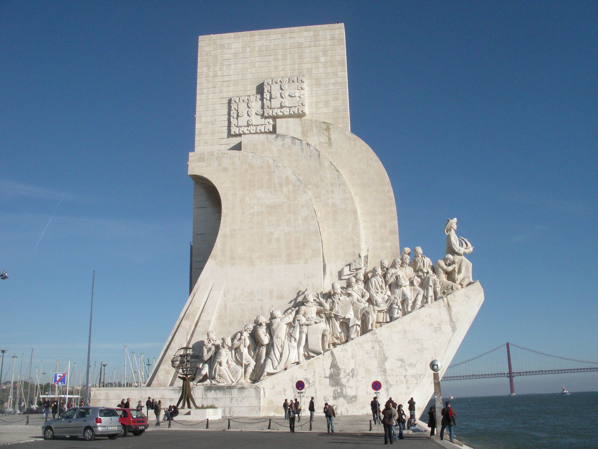 Padrao dos Descobrimentos 06